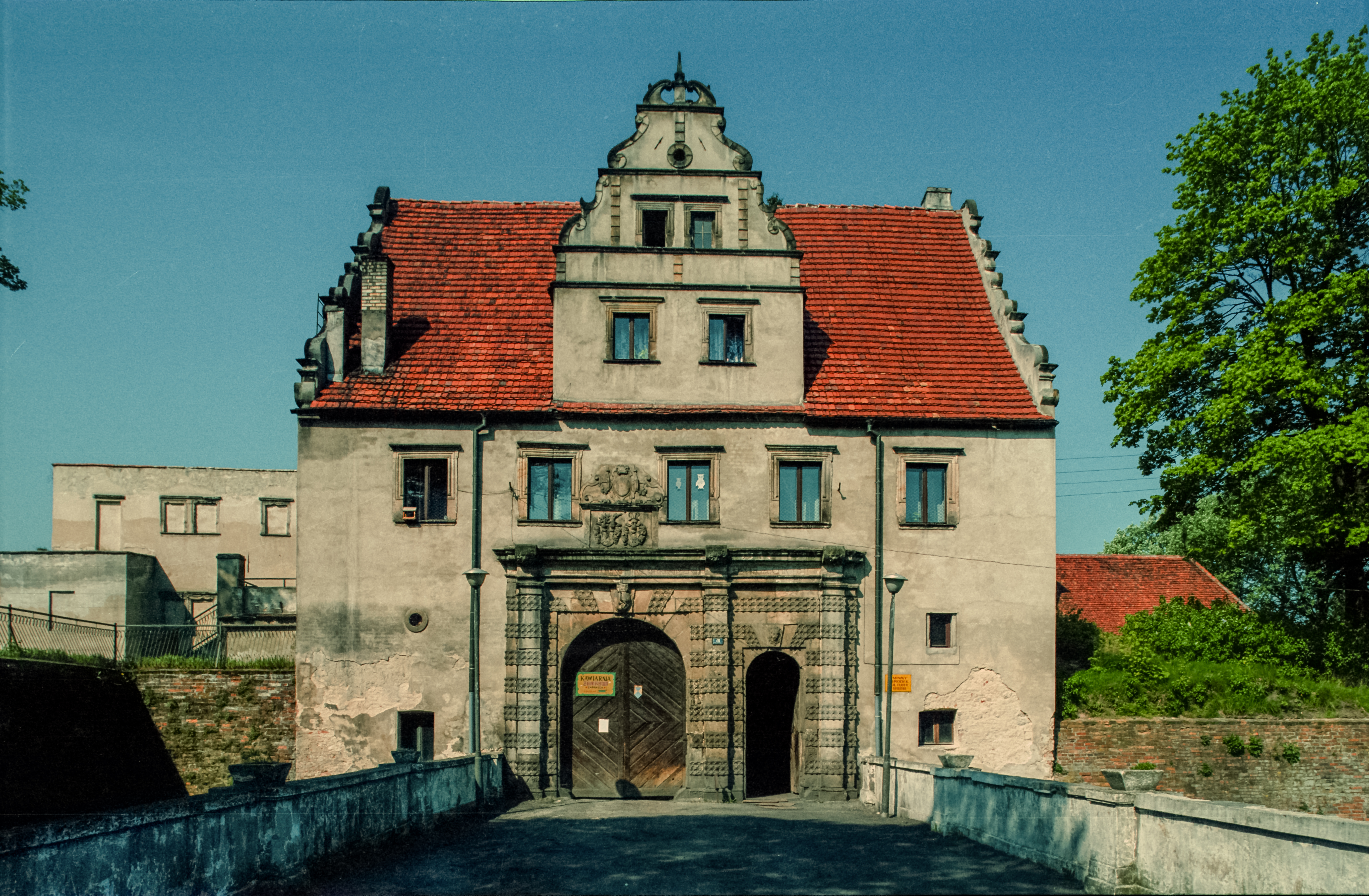 Siedlisko, budynek bramny